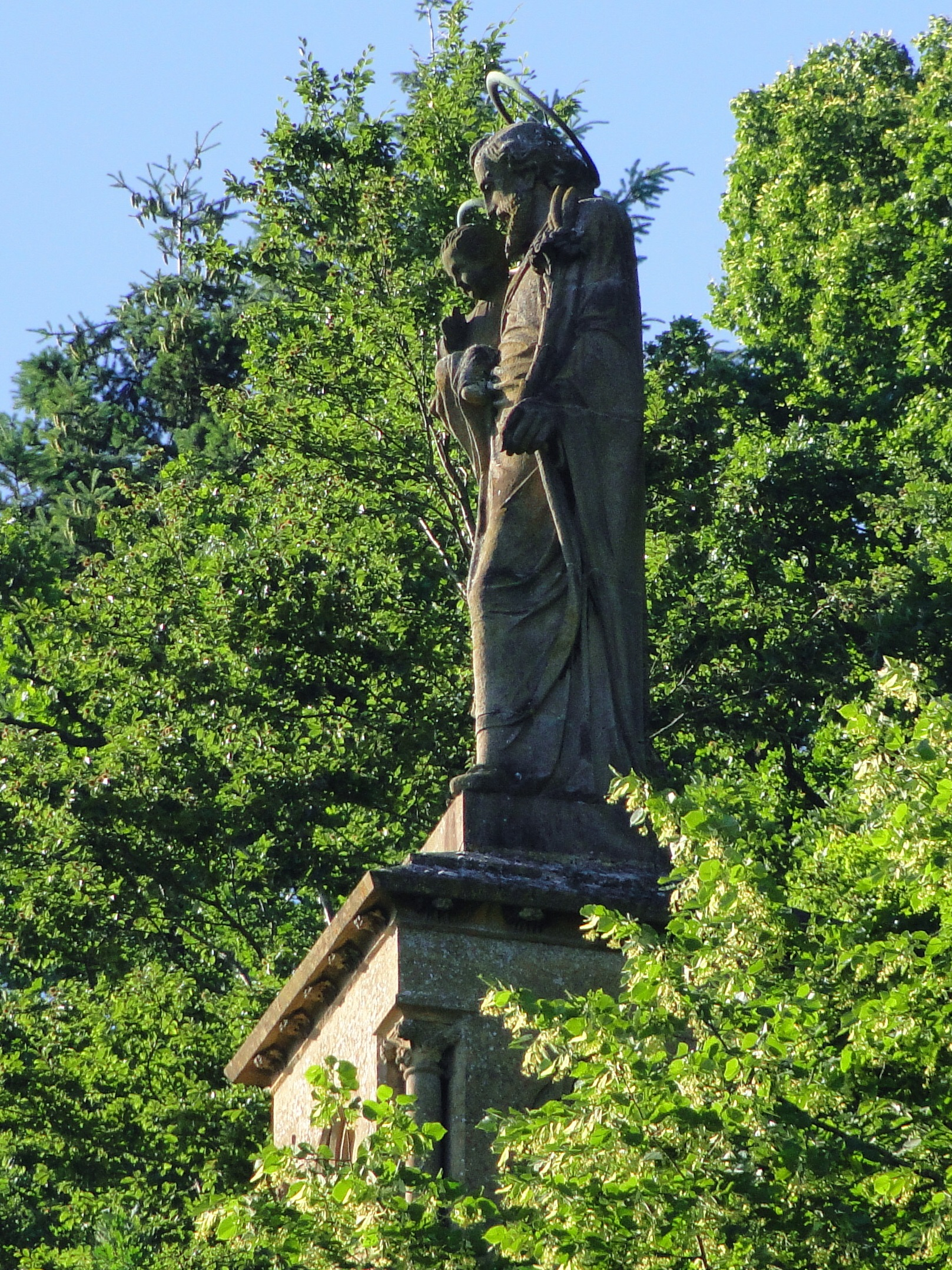 Jousefsstatu um Seminärsbierg (Weimeschhaff) an der Stad Lëtzebuerg. D'Statu vom hollännesche Sculpteur Stracké gouf de 17. Oktober 1888 ageweit.